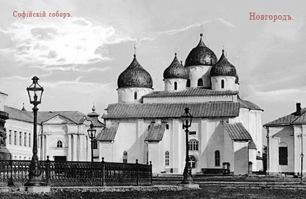 Софийский собор до 1900 года